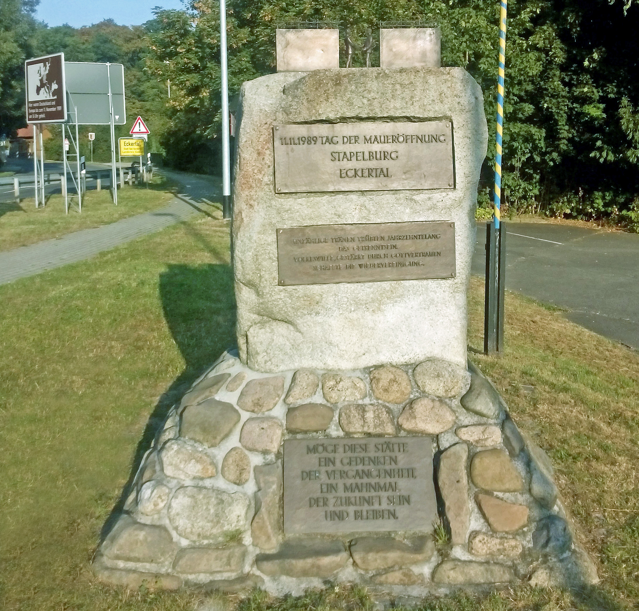 Denkmal zur Erinnerung an die Öffnung der innerdeutschen Grenze zwischen Stapelburg und Eckertal 1989.